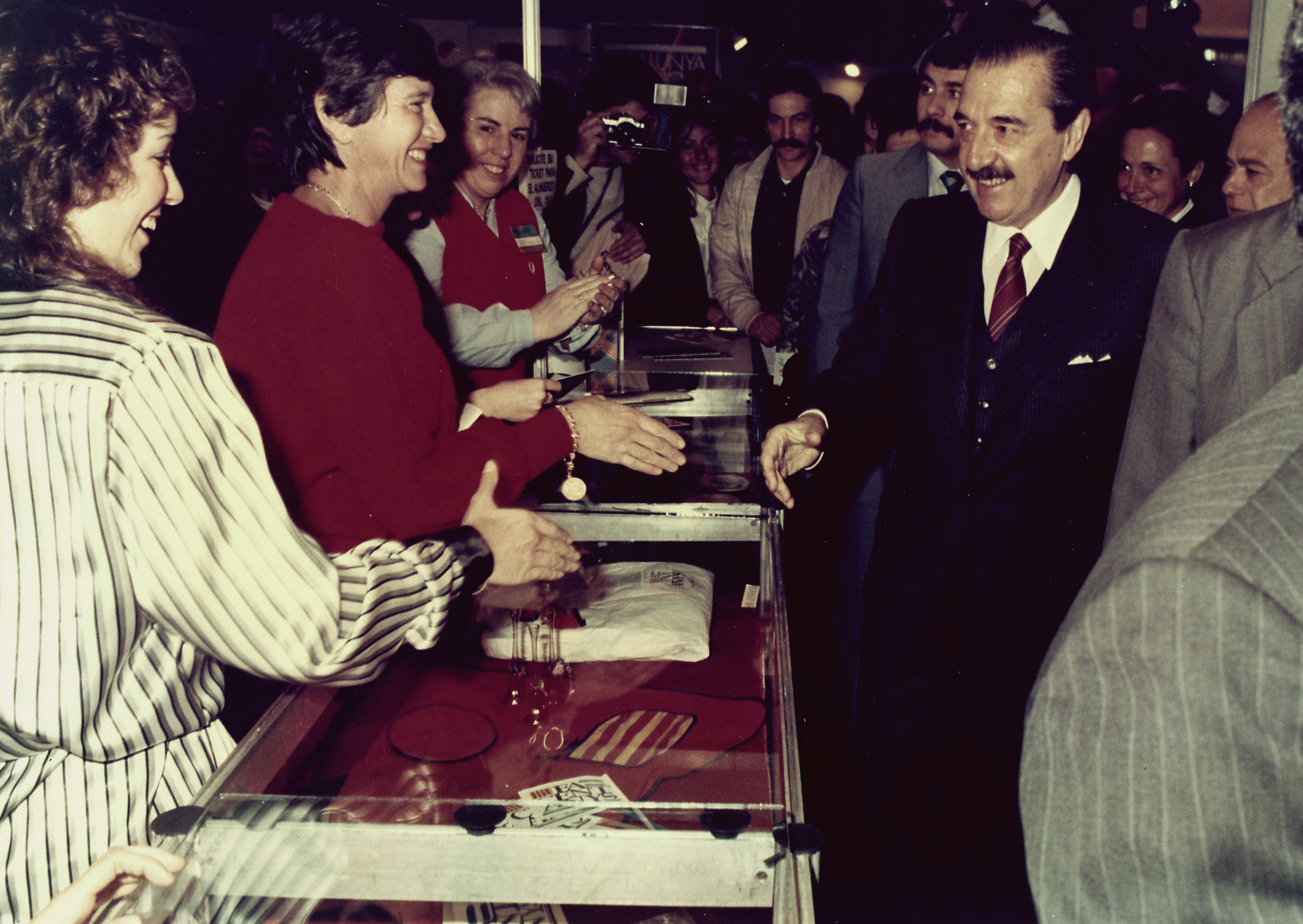 El ex presidente Raúl Alfonsín durante la Expo 1986 de la que participó el Casal de Catalunya